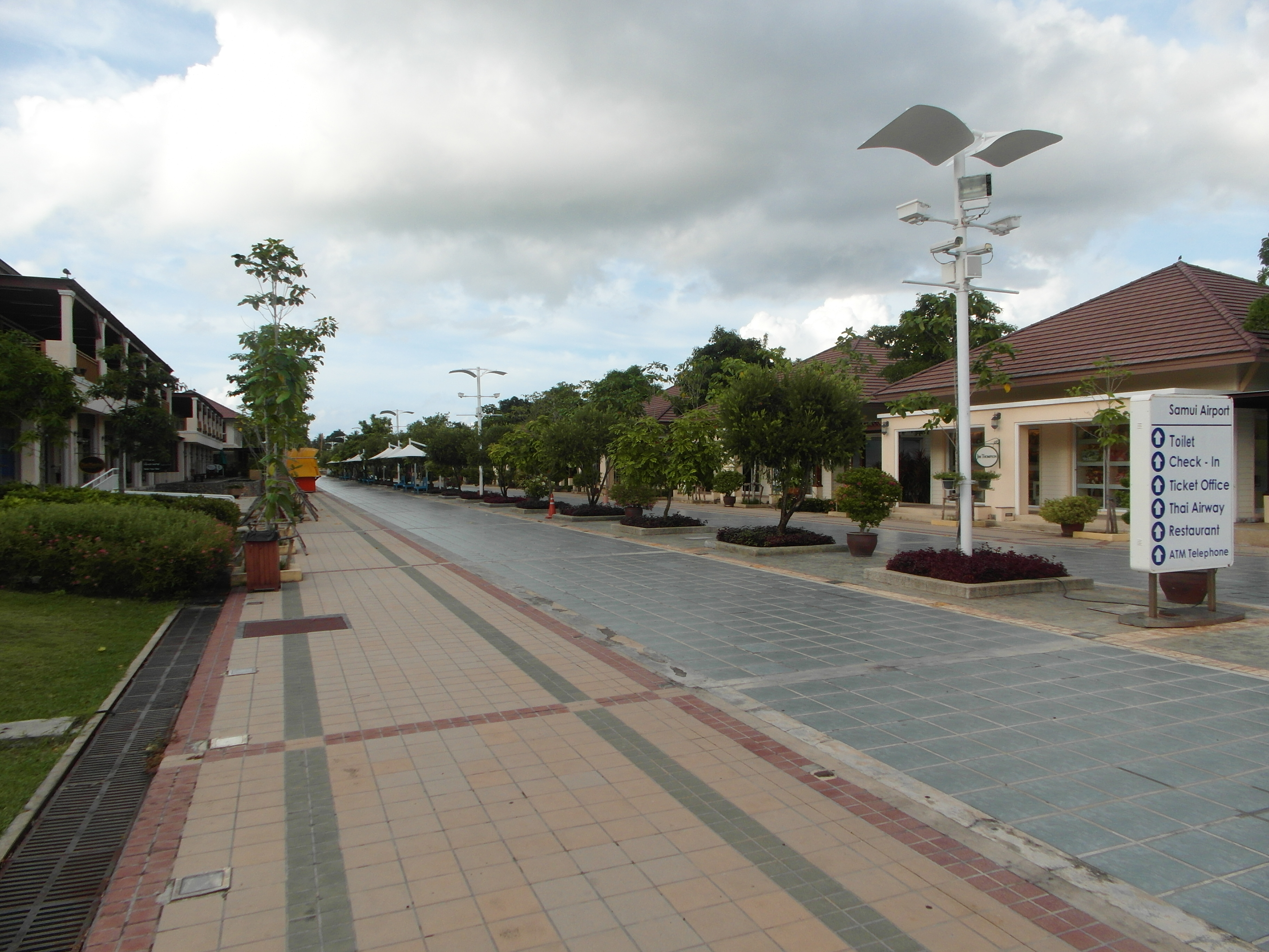 Аэропорт Самуи май 2013